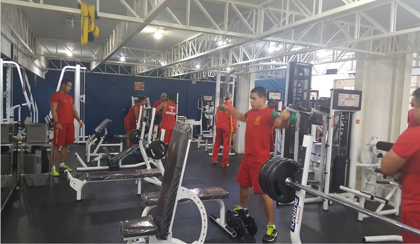 Foto de militares do Comando do Corpo de Bombeiros do Paraná realizando atividade física.